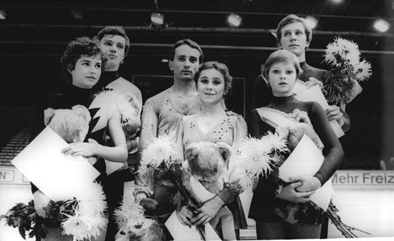 Eiskunstläufer, DDR, UdSSR ADN-ZB Thieme 20.11.81 Karl-Marx-Stadt: Siegerehrung für die drei Paare nach der ersten Entscheidung beim XXI. Internationalen Eiskunstlaufwettbewerb um den Pokal der Blauen Schwerter (am 19.11.81). Bildmitte die Gewinner Birgit Lorenz - Knut Schubert (SC Dynamo Berlin), links die Zweitplazierten Jelena Kaschinzewa - Alexej Pacodin und rechts die Dritten Jelena Betschke - Waleri Kornjenko (alle UdSSR).